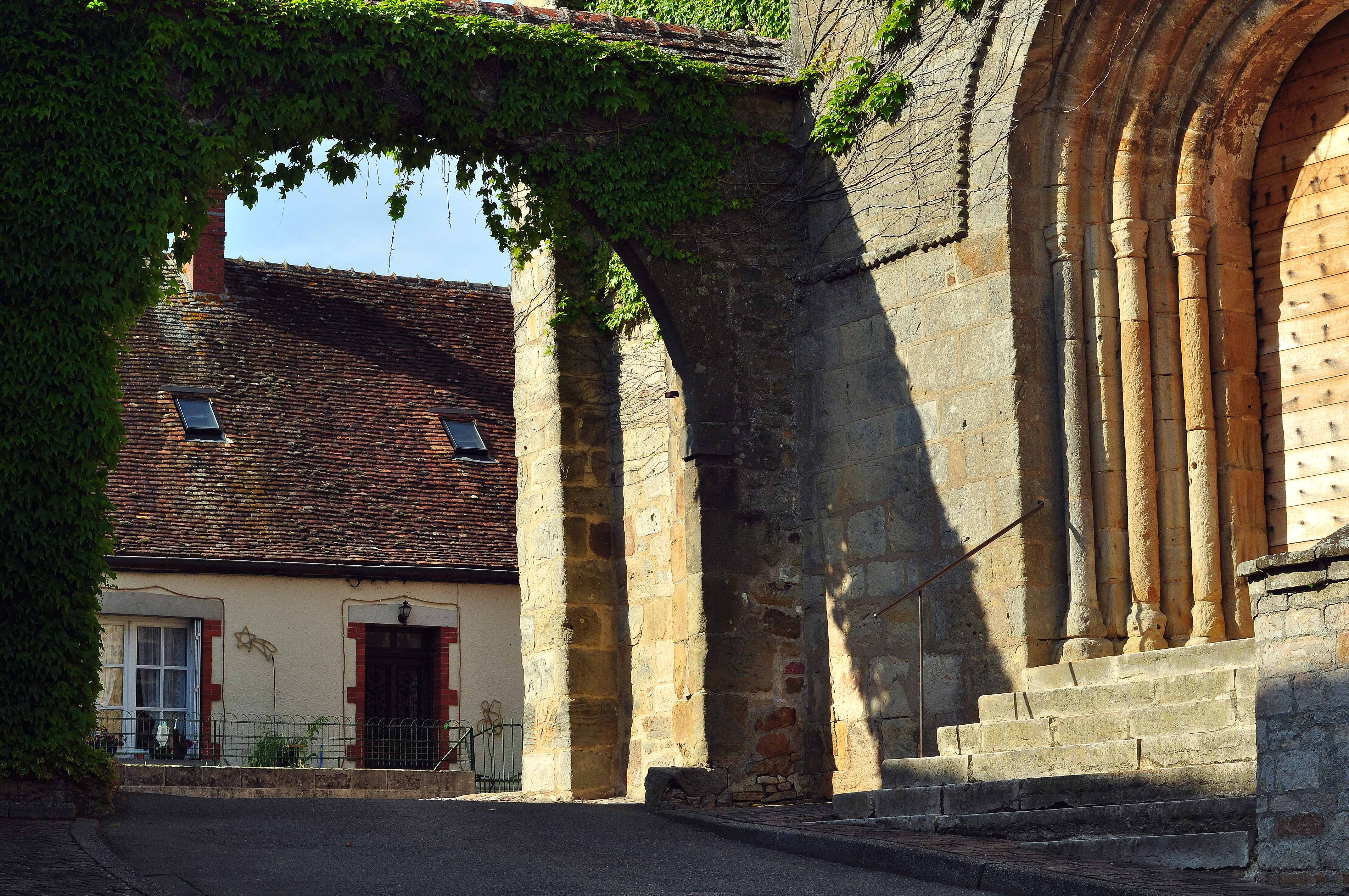 Cette photo montre le porche de l'église ainsi que celui attenant à cette dernière, et enjambant la ruelle.Photo prise à partir de la rue Marx DORMOY par Gérard JOYON 2013 .